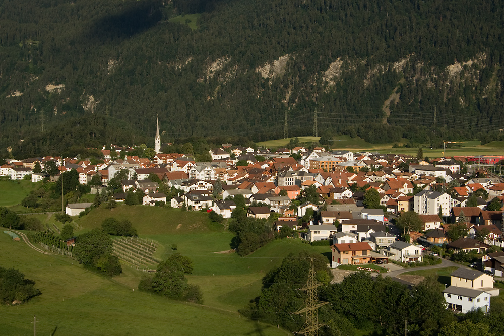 Bonaduz Dorfansicht 002, vom Bot Danisch aus